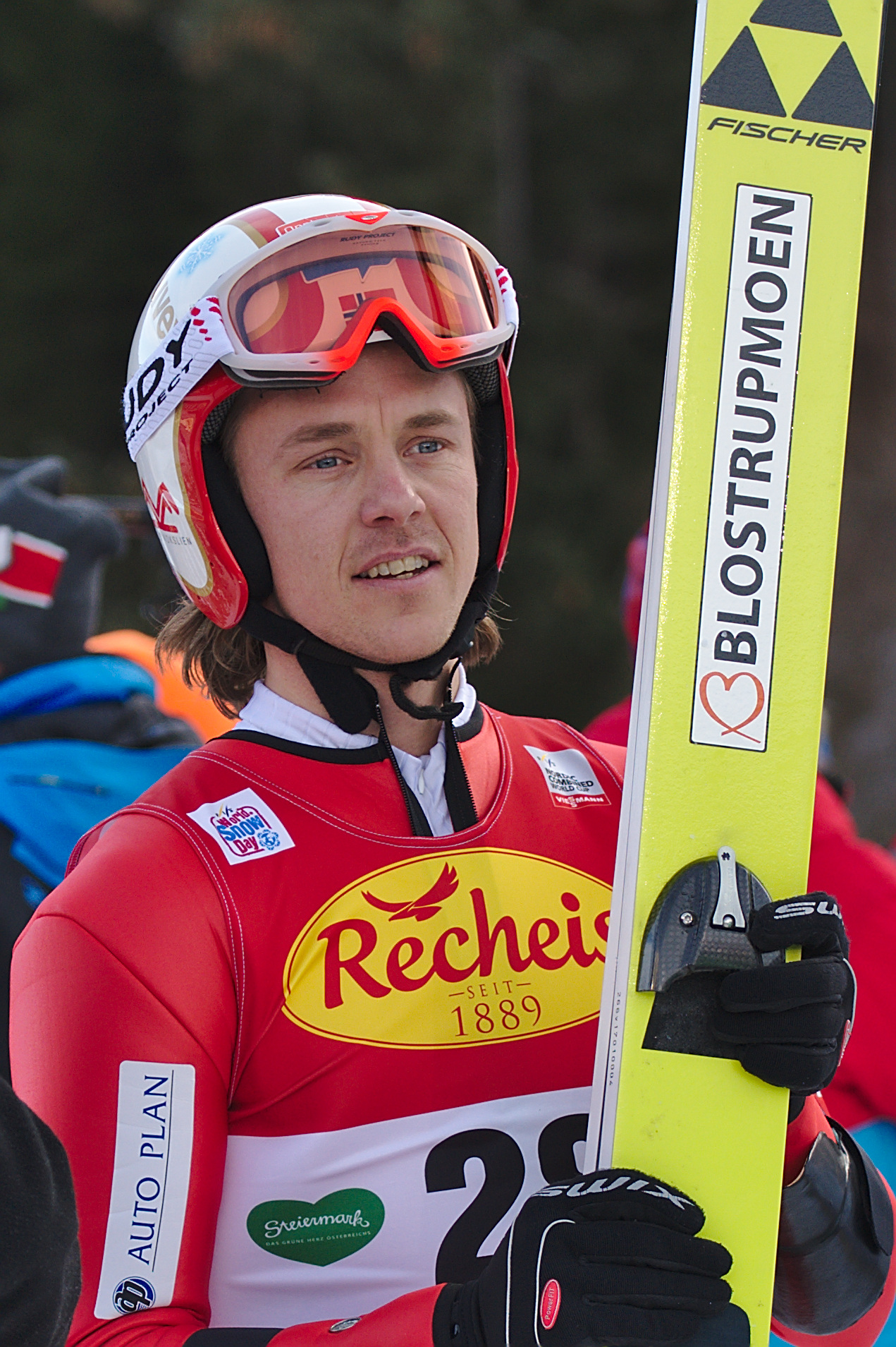 Mikko Kokslien (NOR)